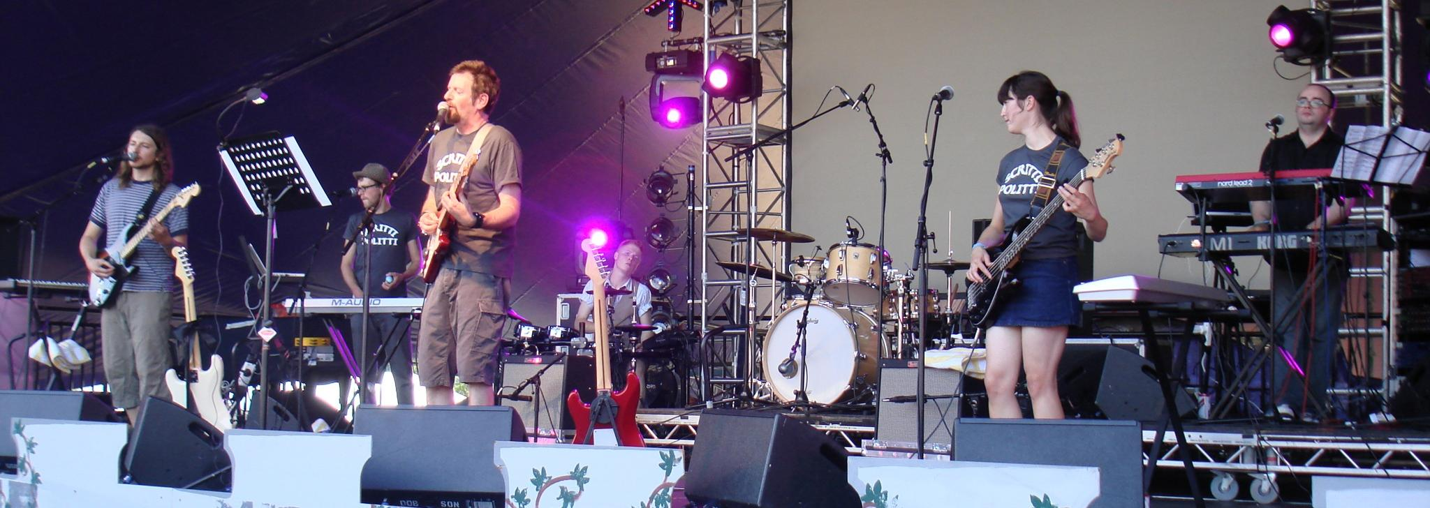 scritti politti live at Big Chill 2006